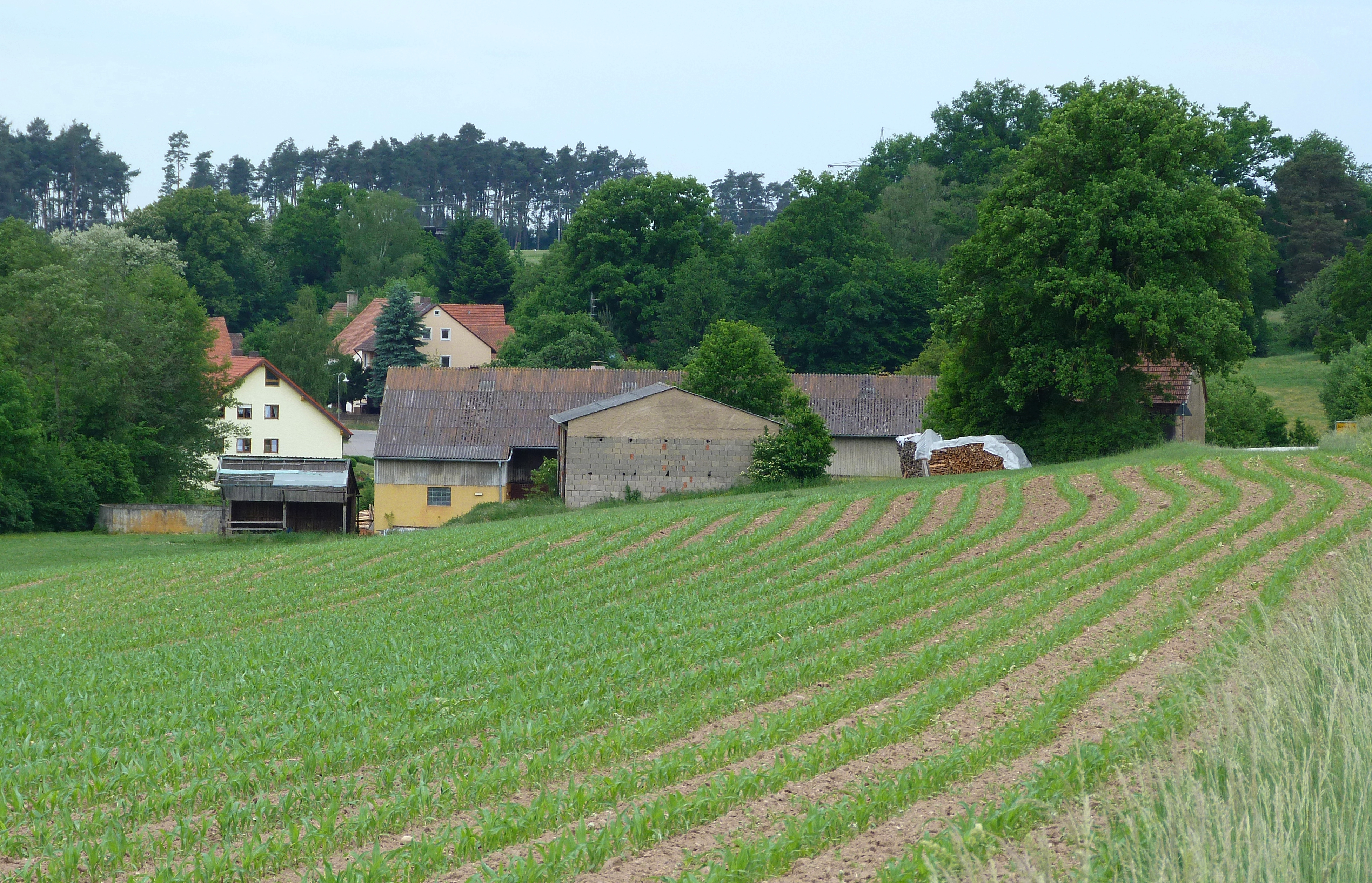 Ortsansicht